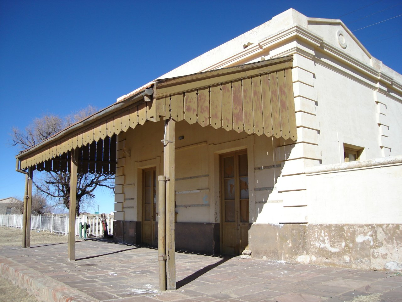 Edificio de la estación Puesto del Marqués del Ferrocarril General Manuel Belgrano de la red ferroviaria argentina, entre Abra Pampa y Pumahuasi. Departamento Cochinoca, provincia de Jujuy.